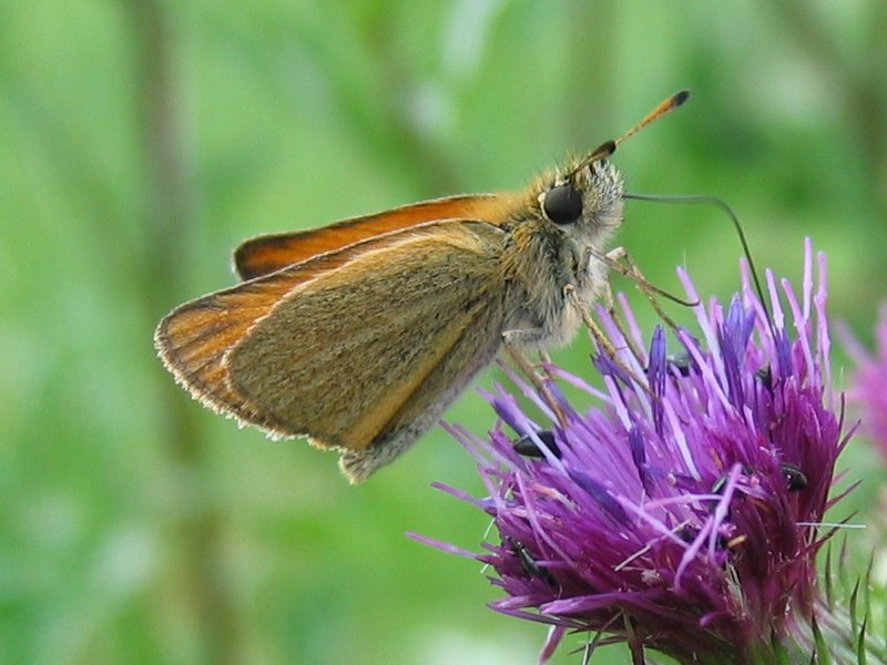 Schwarzkolbiger Braun-Dickkopffalter (Thymelicus lineola)